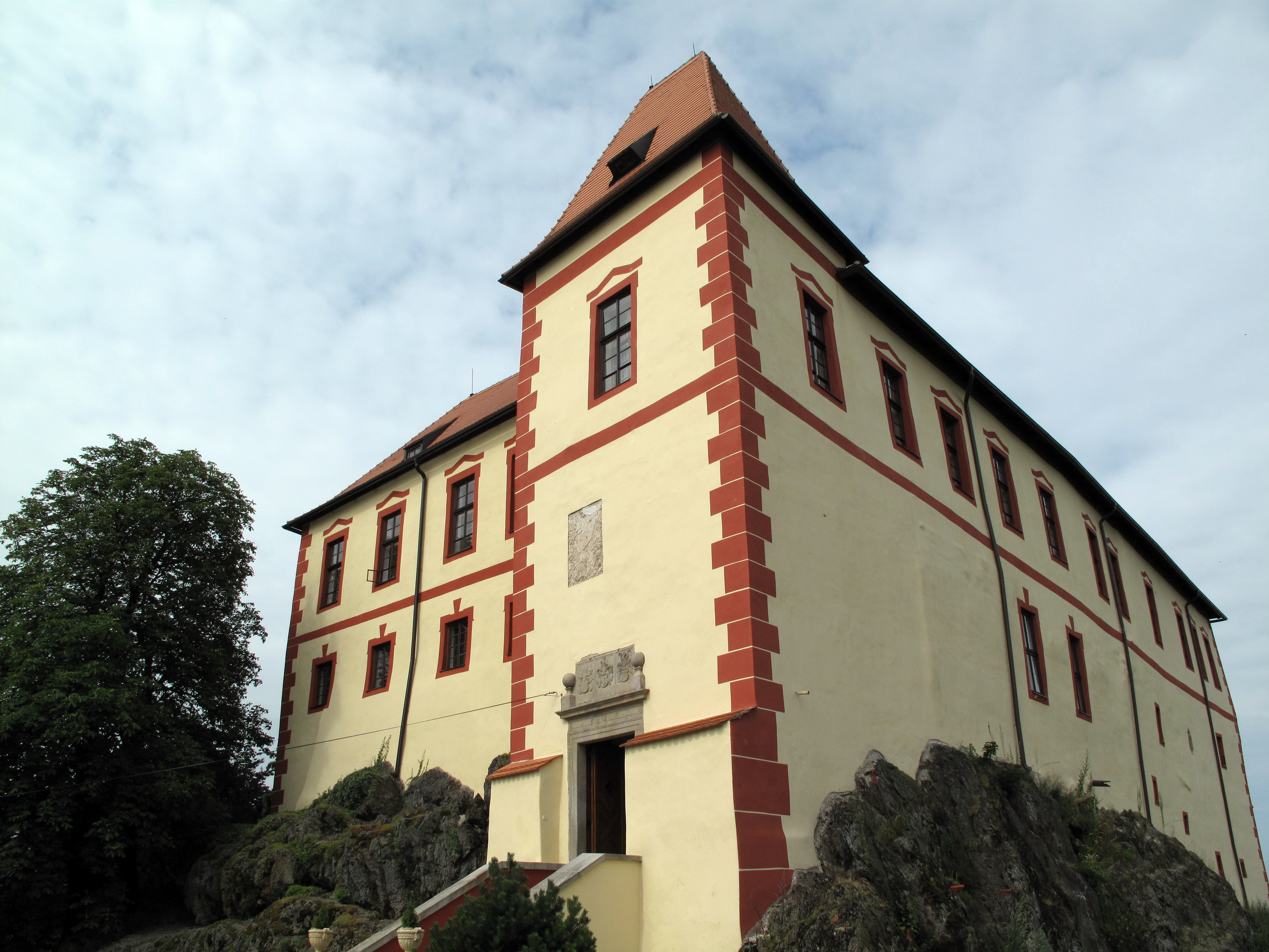 Hrad Kámen